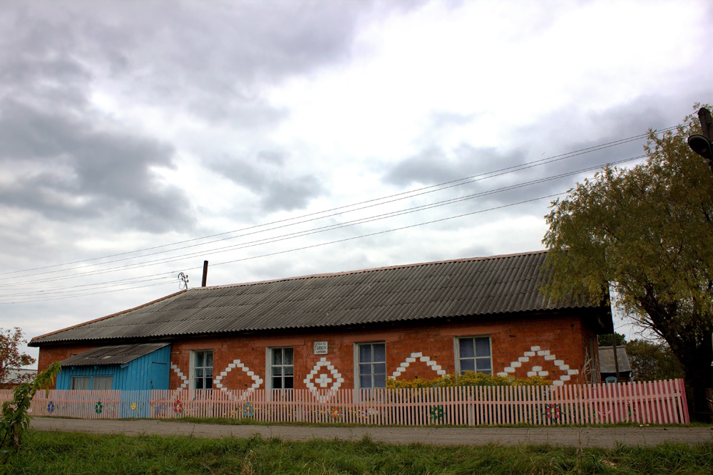 Детский сад «Голубок» в селе Бутаково Знаменского района Омской области.